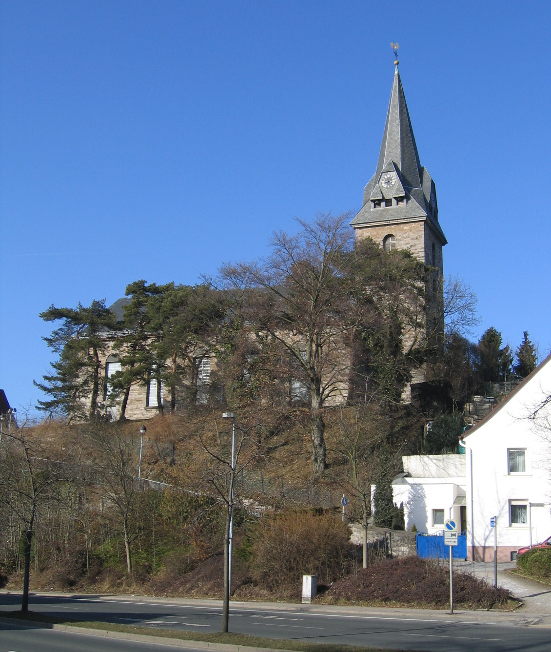 Description: Evangelische Ebbergkirche auf der Felskuppe des Ebbergs in Hemer. Baujahre 1819 bis 1820. Fünfjochiger Saalbau mit viergeschossigem Turm. Bruchsteinmauerwerk. Denkmal seit 1989. Source: selbst fotografiert Date: 19. März 2006 Author: Asio otus